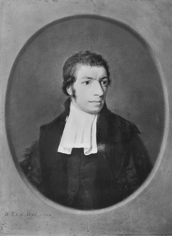 Portret van Johannes Mulder.